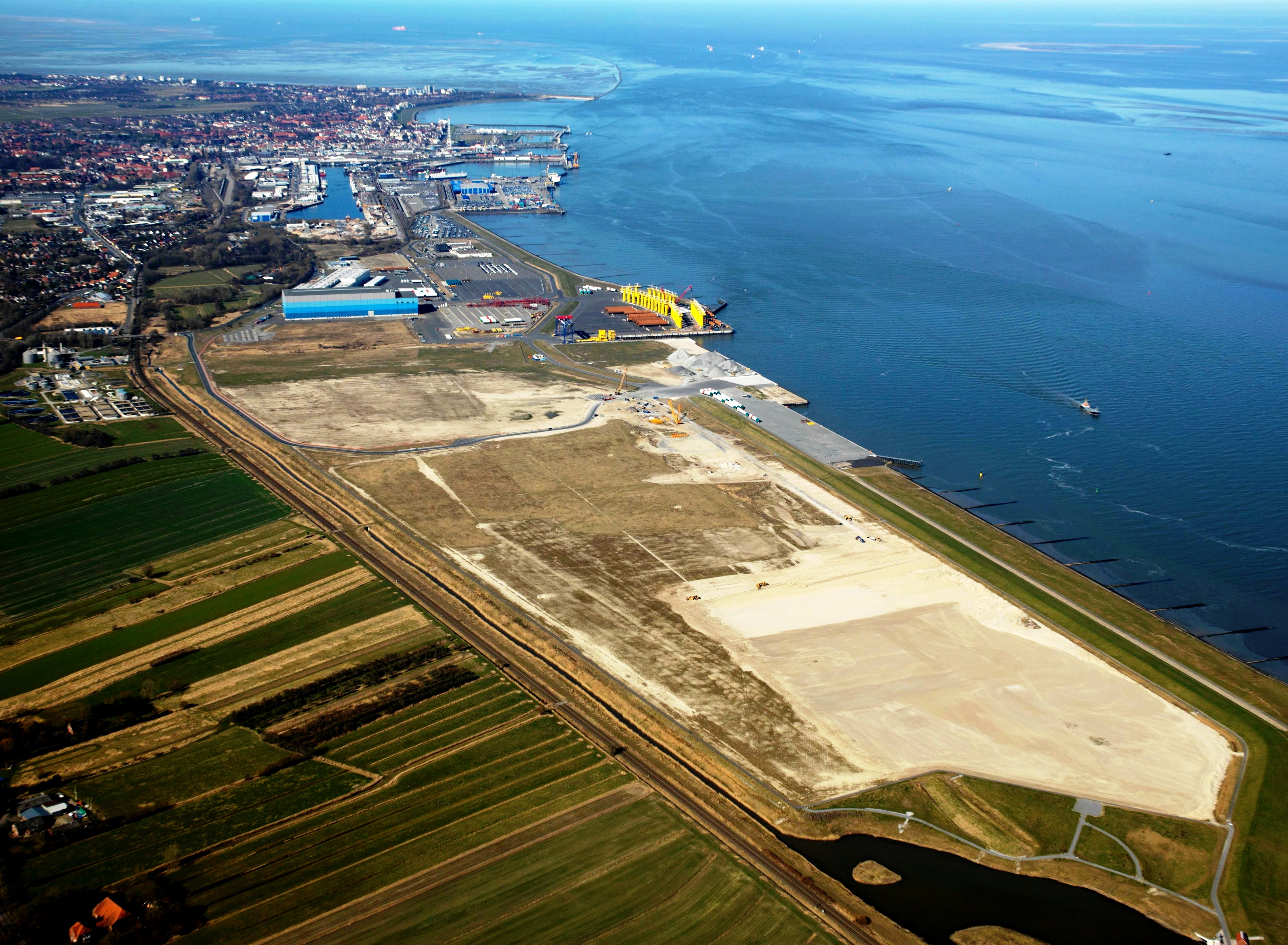 Luftbild Hafen Cuxhaven ohne WEA